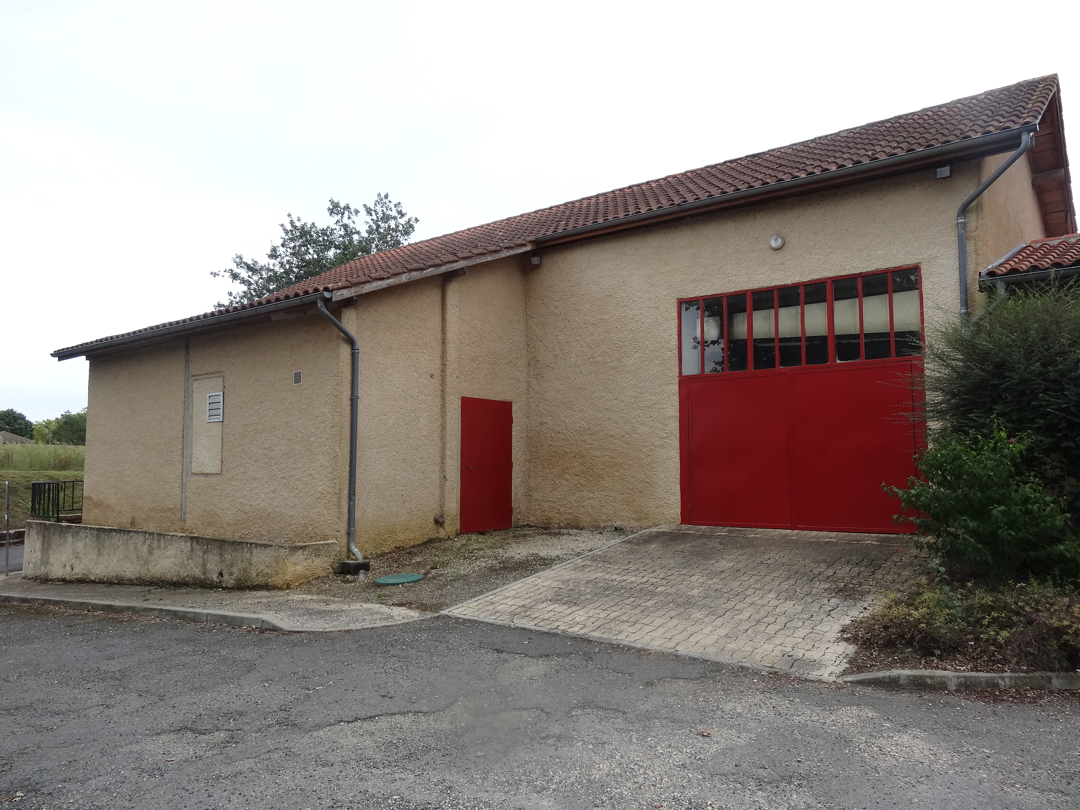 Foyer de Cuélas.